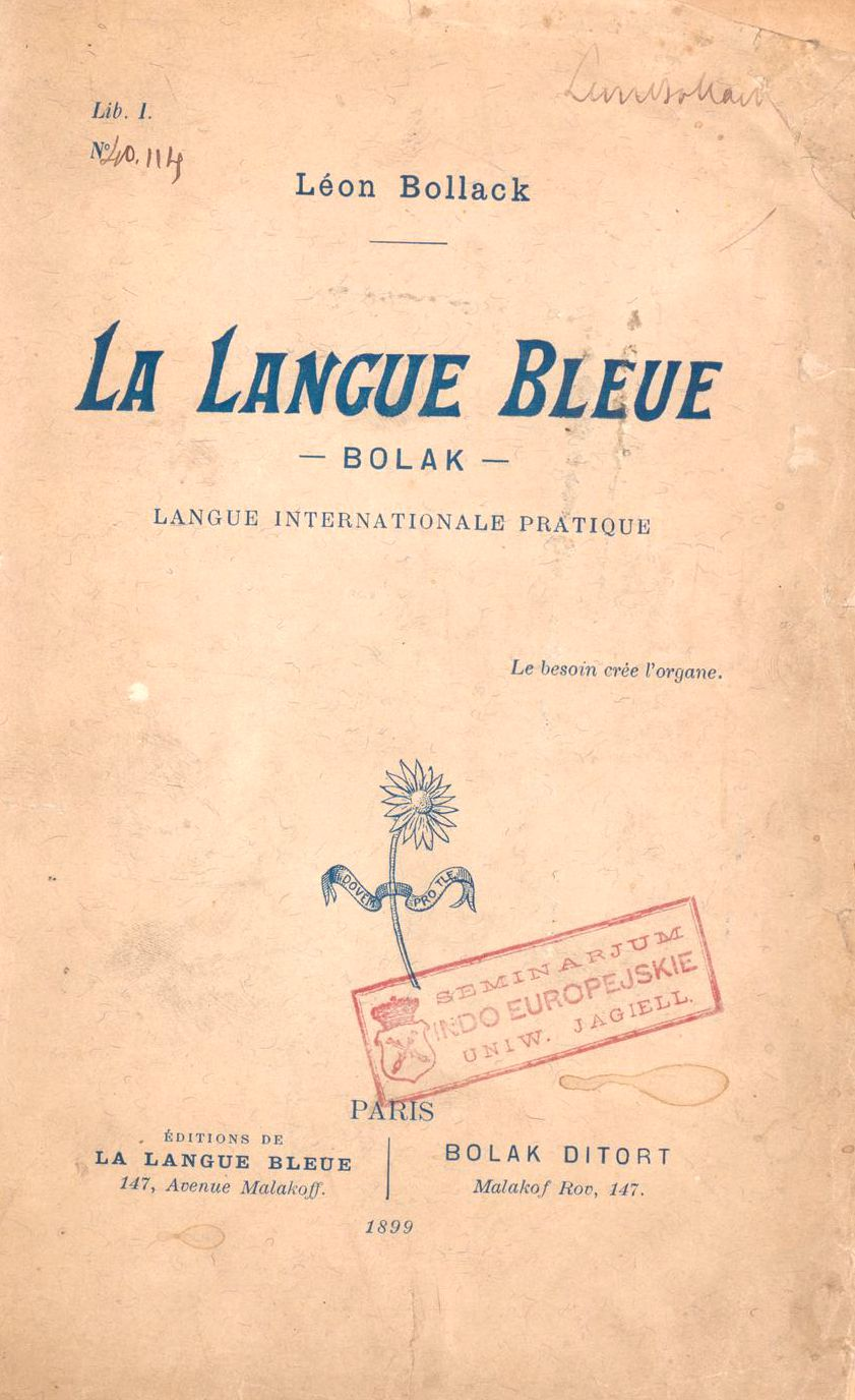 Leon Bollack: La Langue Bleue Bolak: langue internationale pratique, 1899